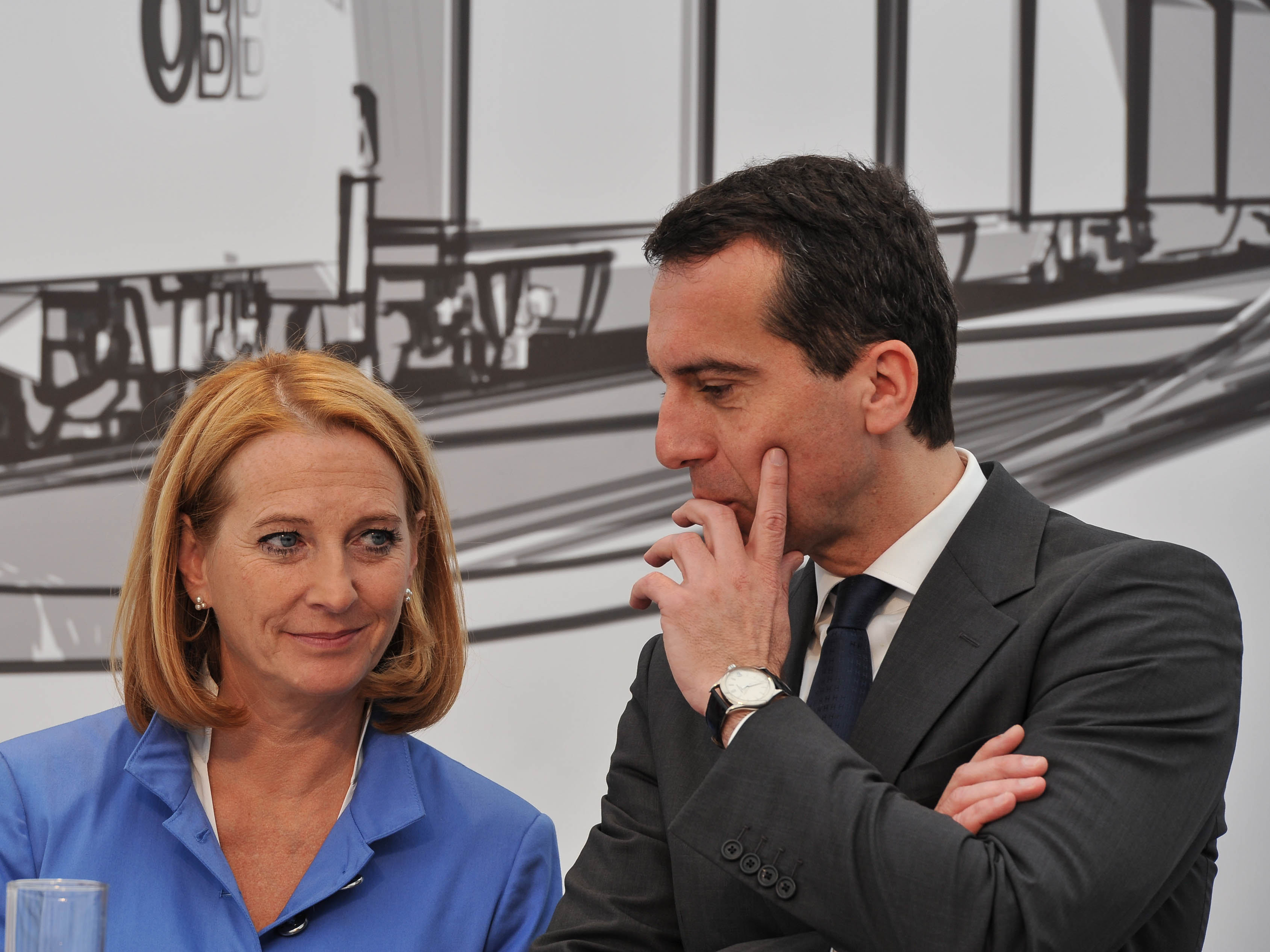 Spatenstich des Semmering-Basistunnels am 25. April 2012: Christian Kern, Doris Bures